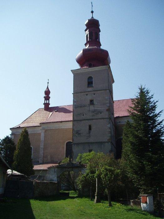 Kostel svatého Petra a Pavla, Šlapanov, Vysočina region, Czech republic